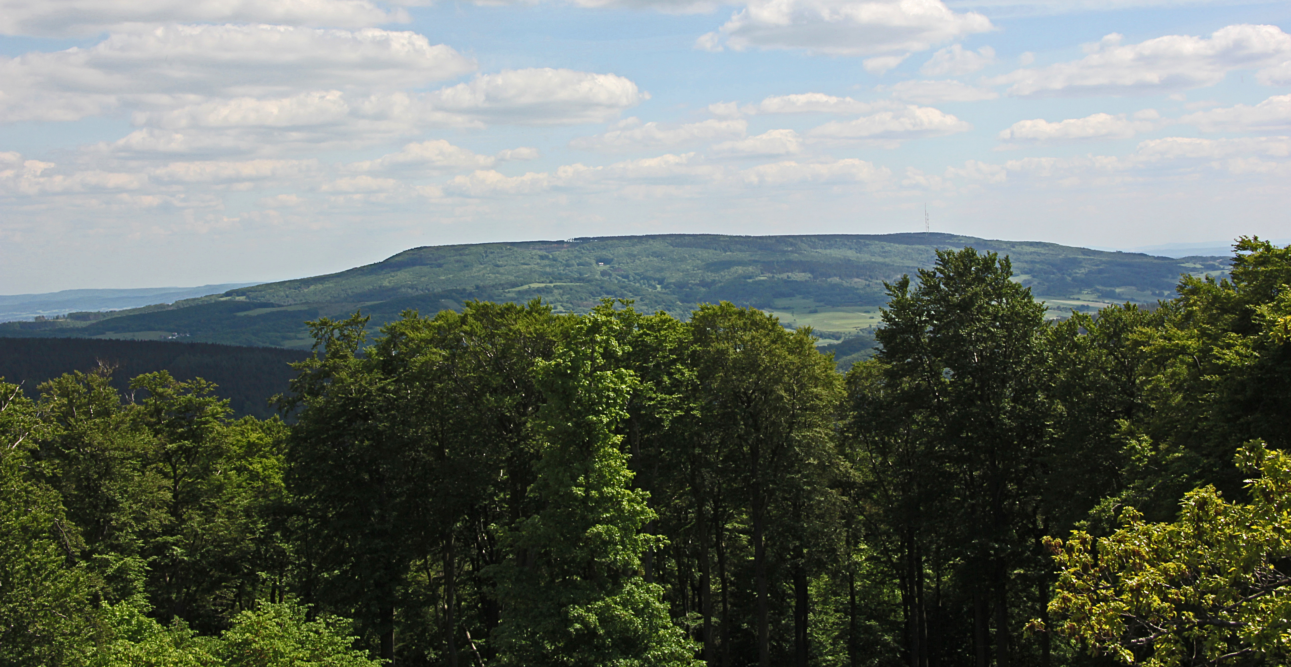 Der Hohe Meißner. Ansicht vom Aussichtsturm auf dem Bilstein (641 + 20 m) (von Nordnordwesten).